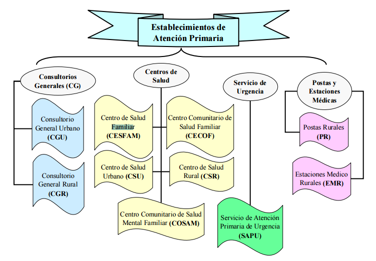 Diagrama de los establecimientos de atención primeria en Chile.